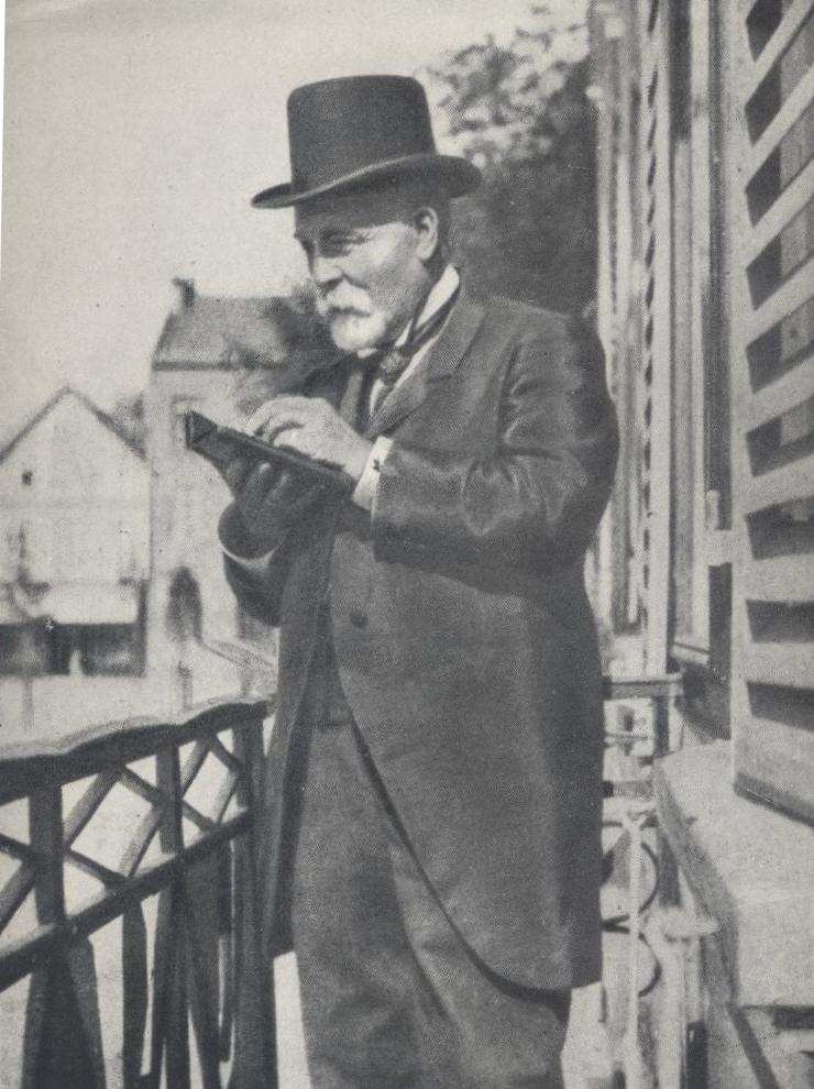 Fotografia d'època on apareix Josep Oller i Roca.